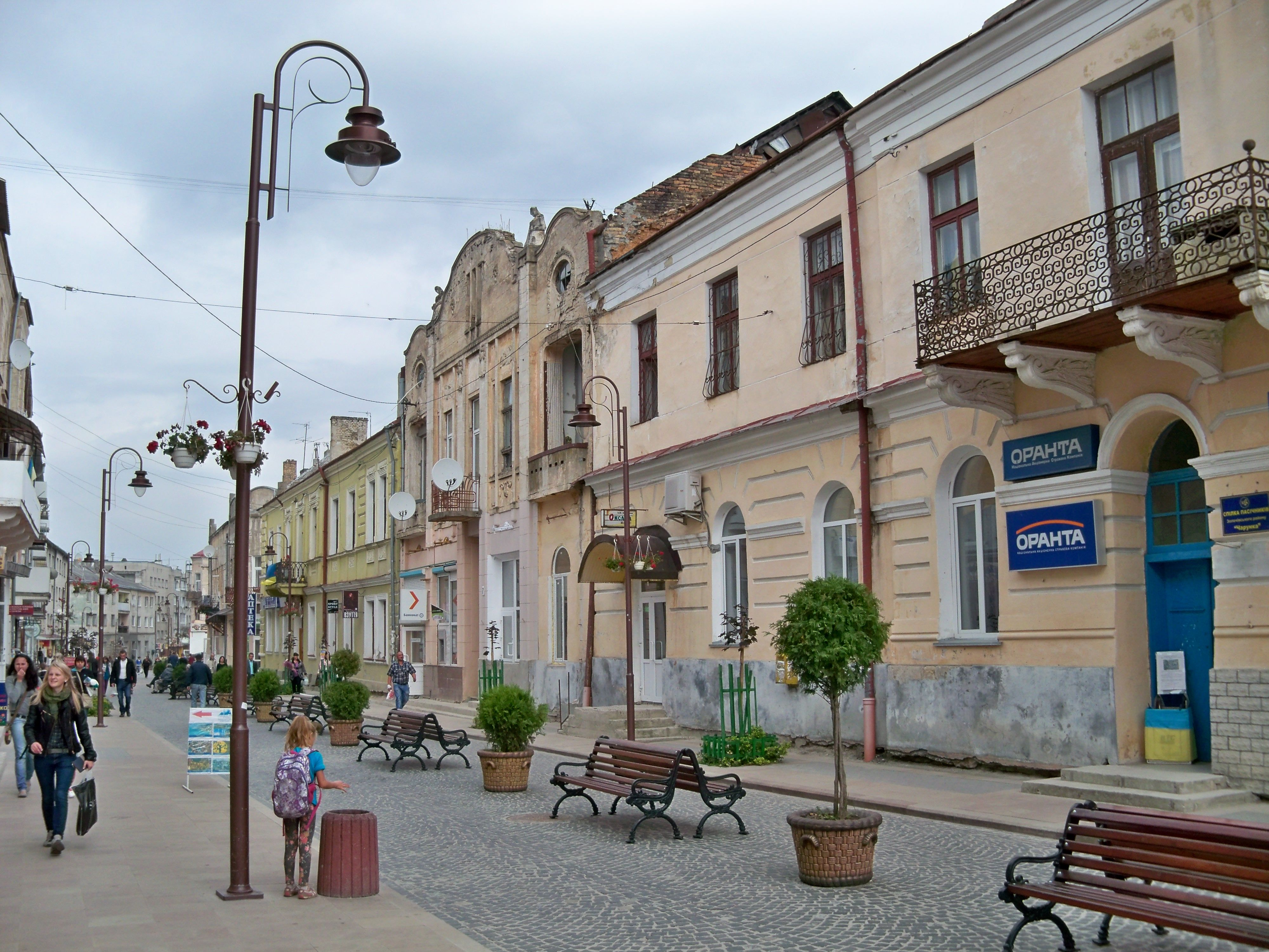 Житловий будинок, Золочів, вул. Шашкевича, 7